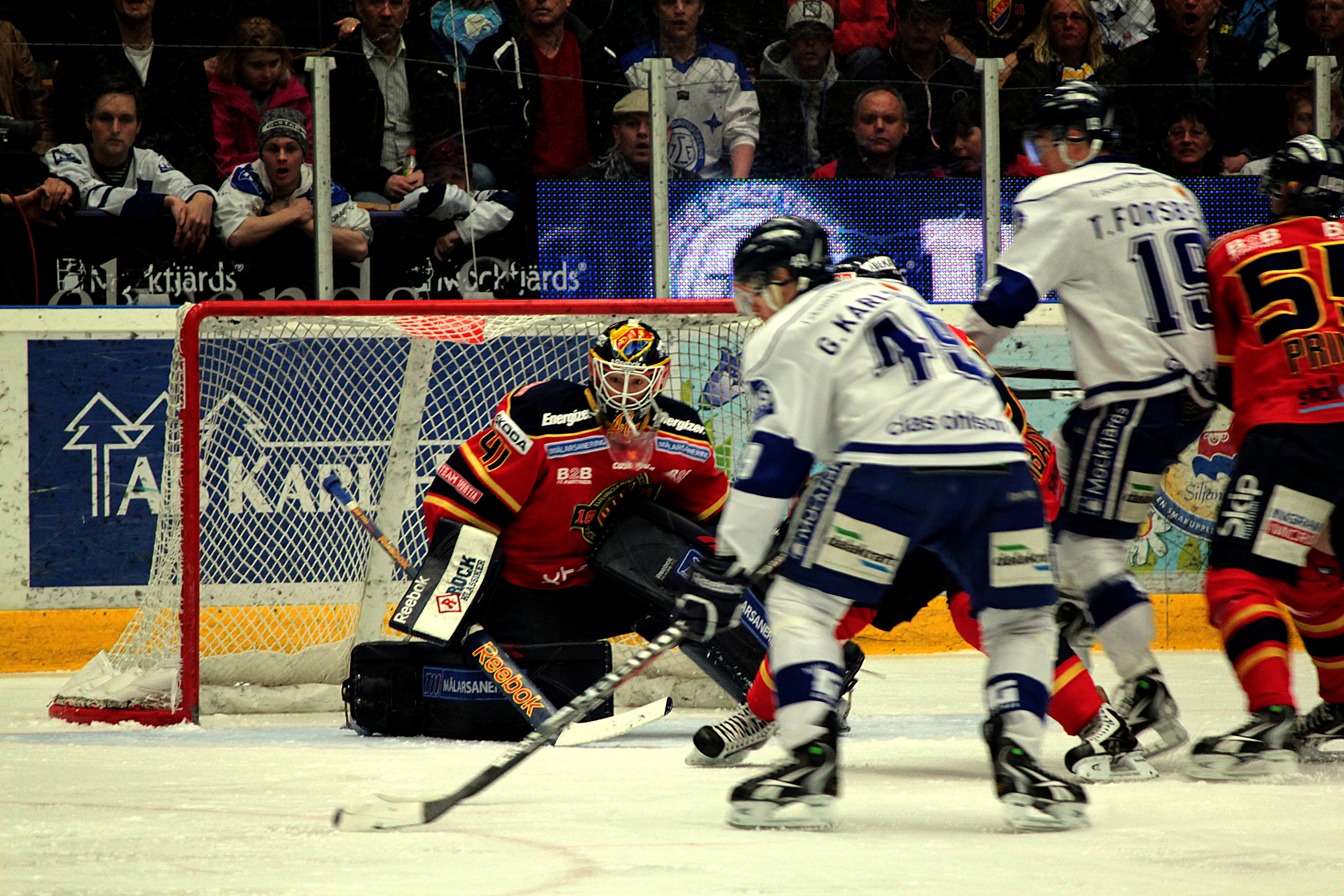 Kval till Elitserien. Leksands IF mot Djurgårdens IF i Leksand 2012-03-31